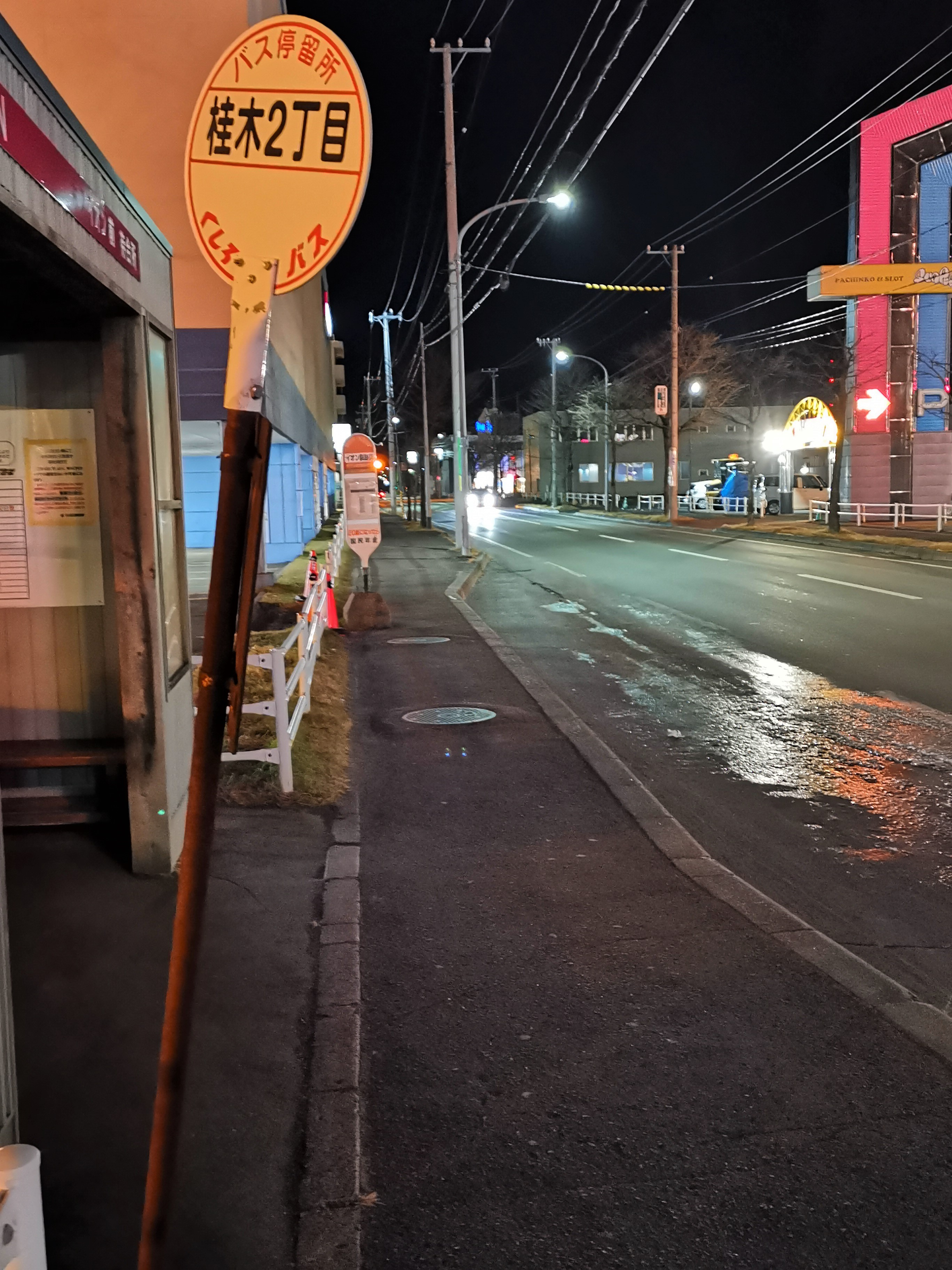 同一同事業者別路線によって異なる名称を与えられた停留所